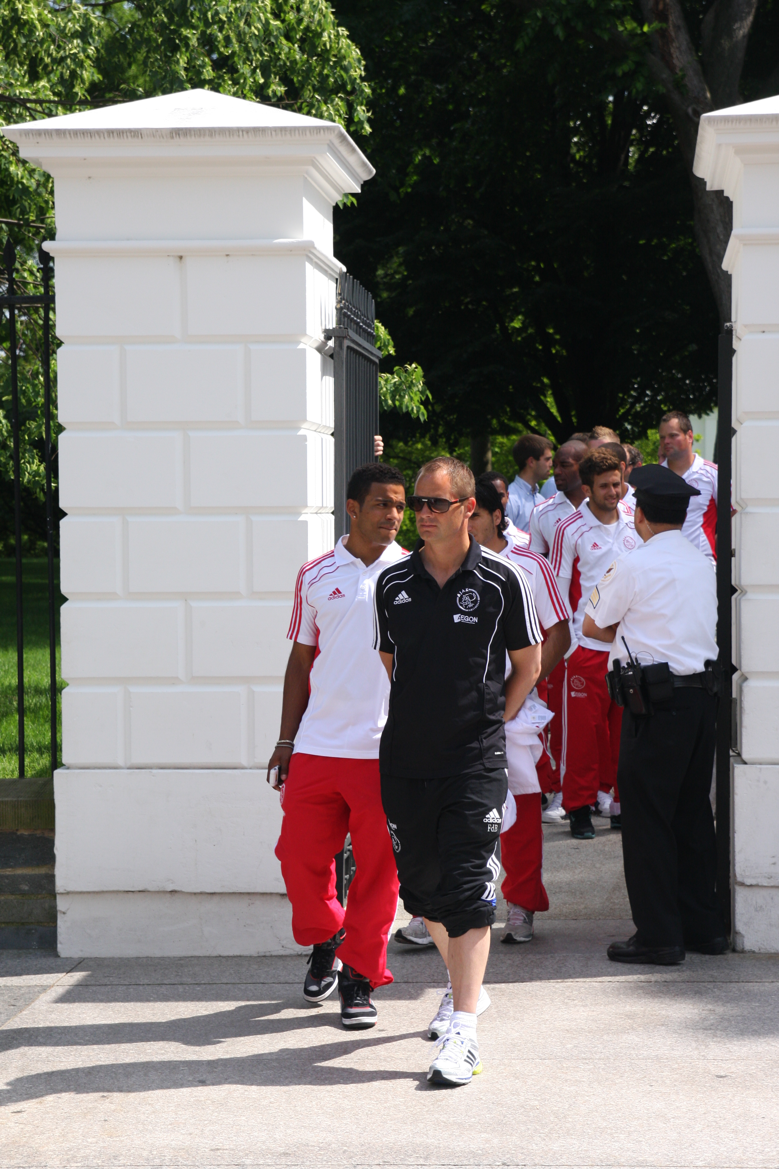 Lorenzo Ebecilio & Frank de Boer